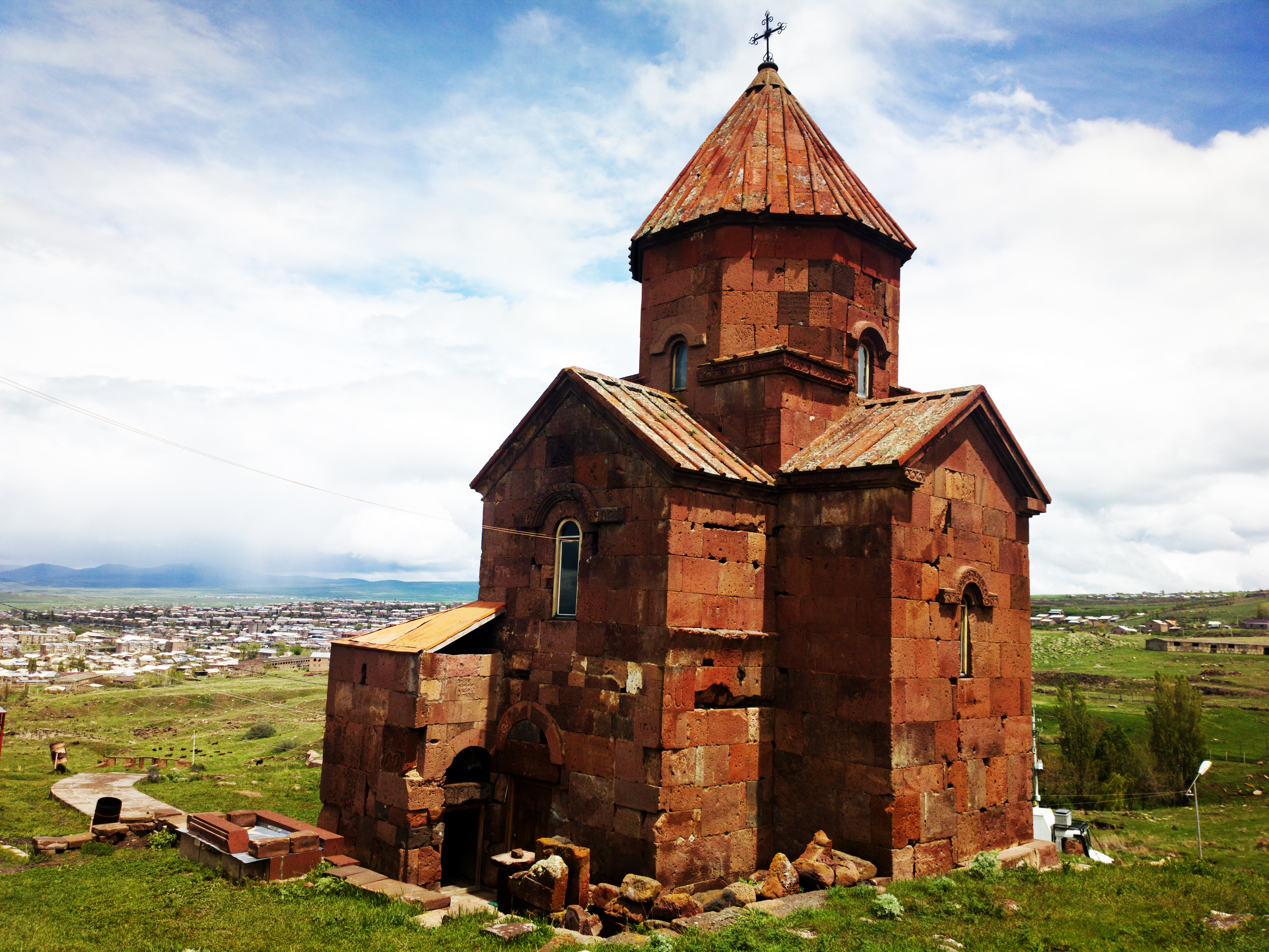 Լմբատավանք 2/5.1